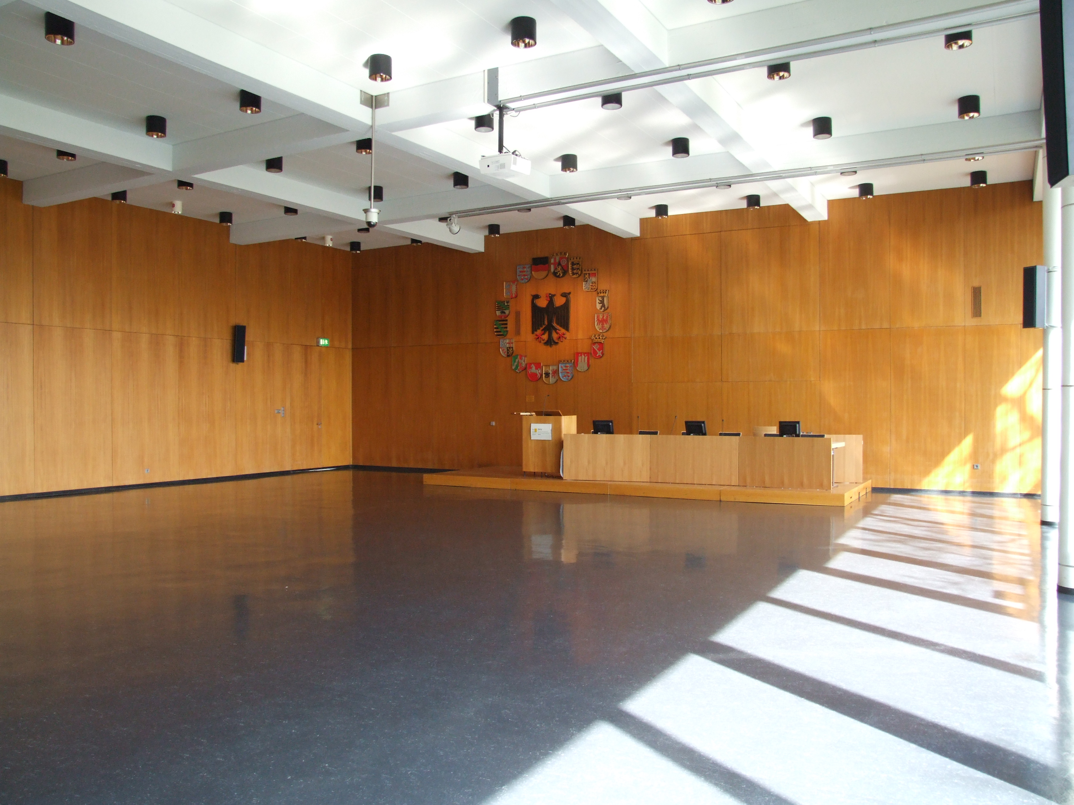 Universität Speyer, Freiherr-vom-Stein-Str. 2: Aula mit Blick nach Osten zur Wappenwand